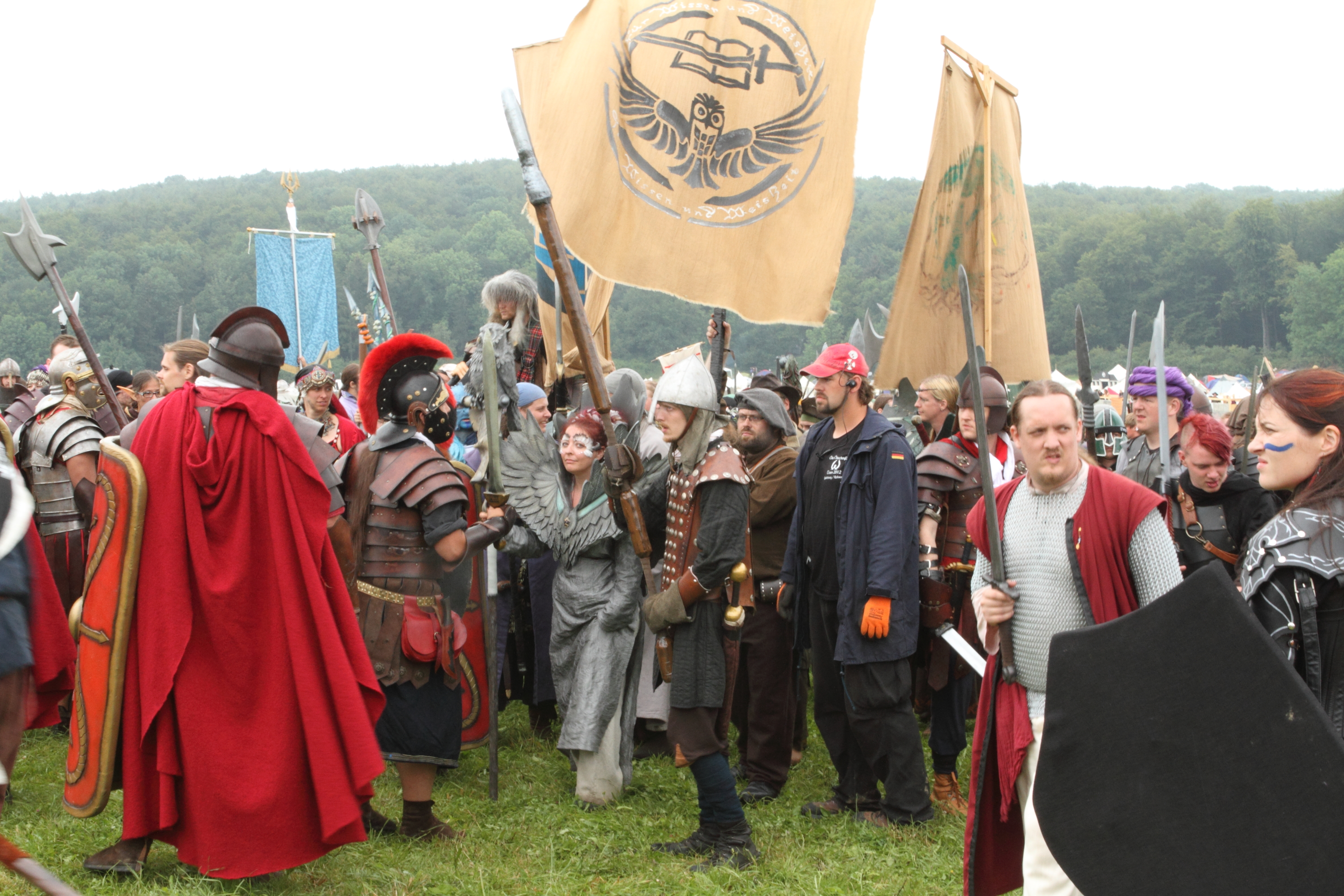 Stseen larbi Drachenfest 2012 lõpulahingust